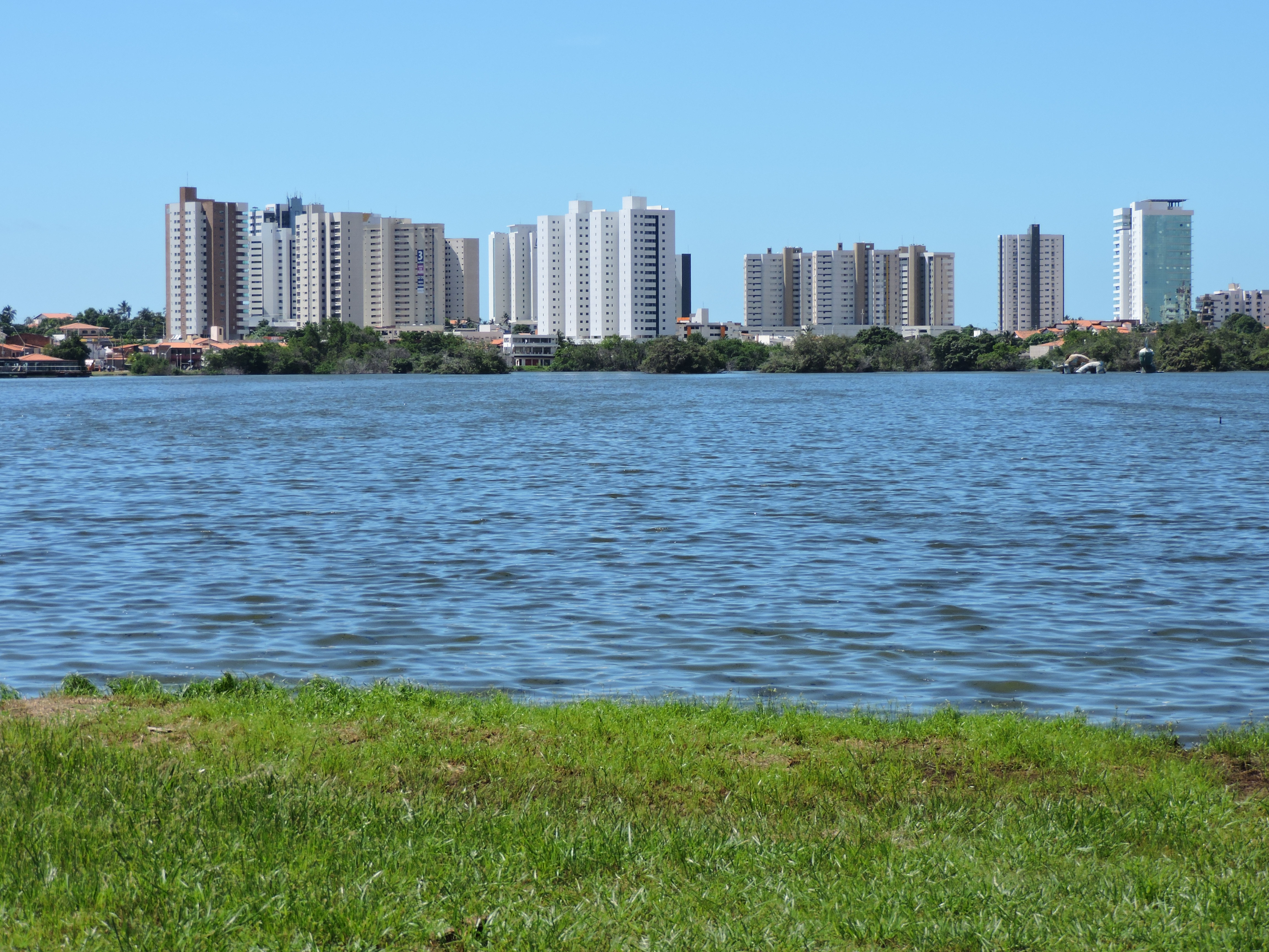 Fotos da lagoa